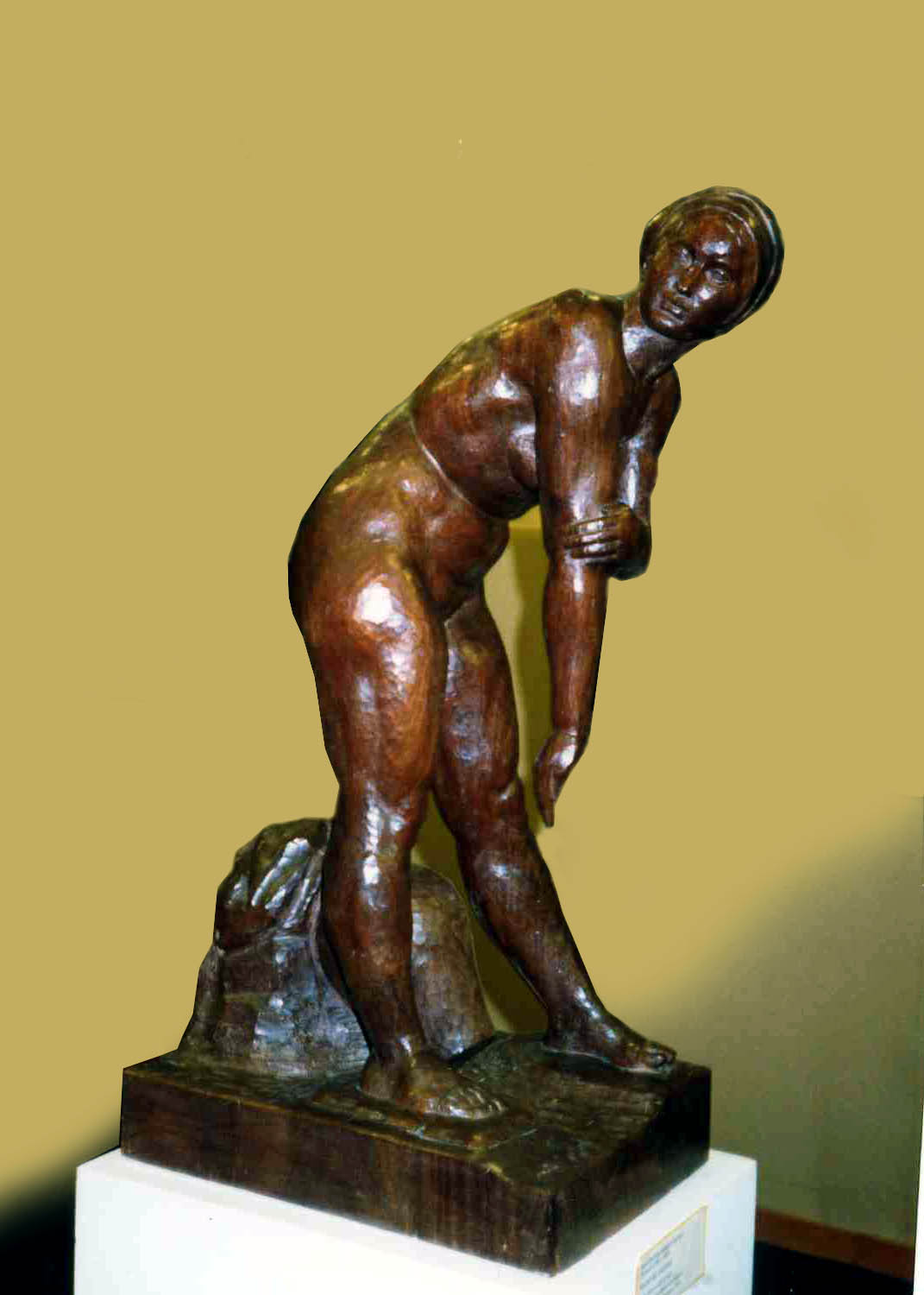 Juan Adsuara Mujer del cantaro.Escultura